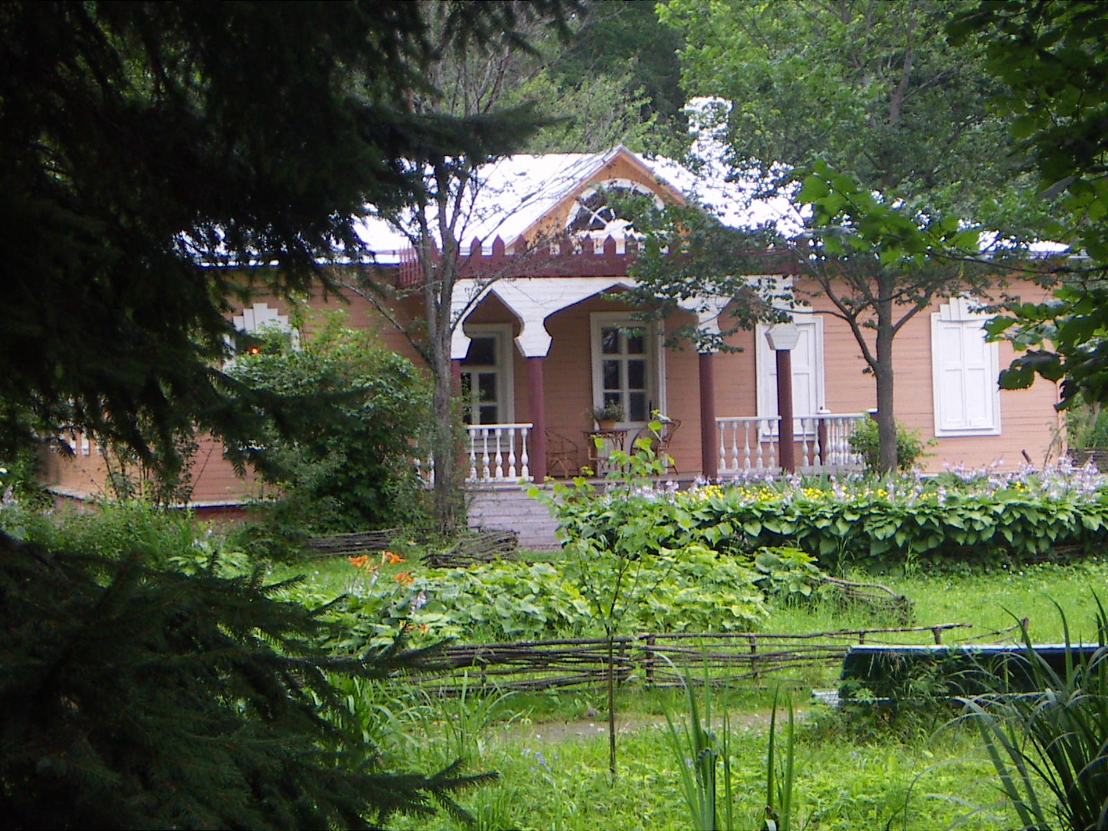 Усадьба Мелихово в Подмосковье